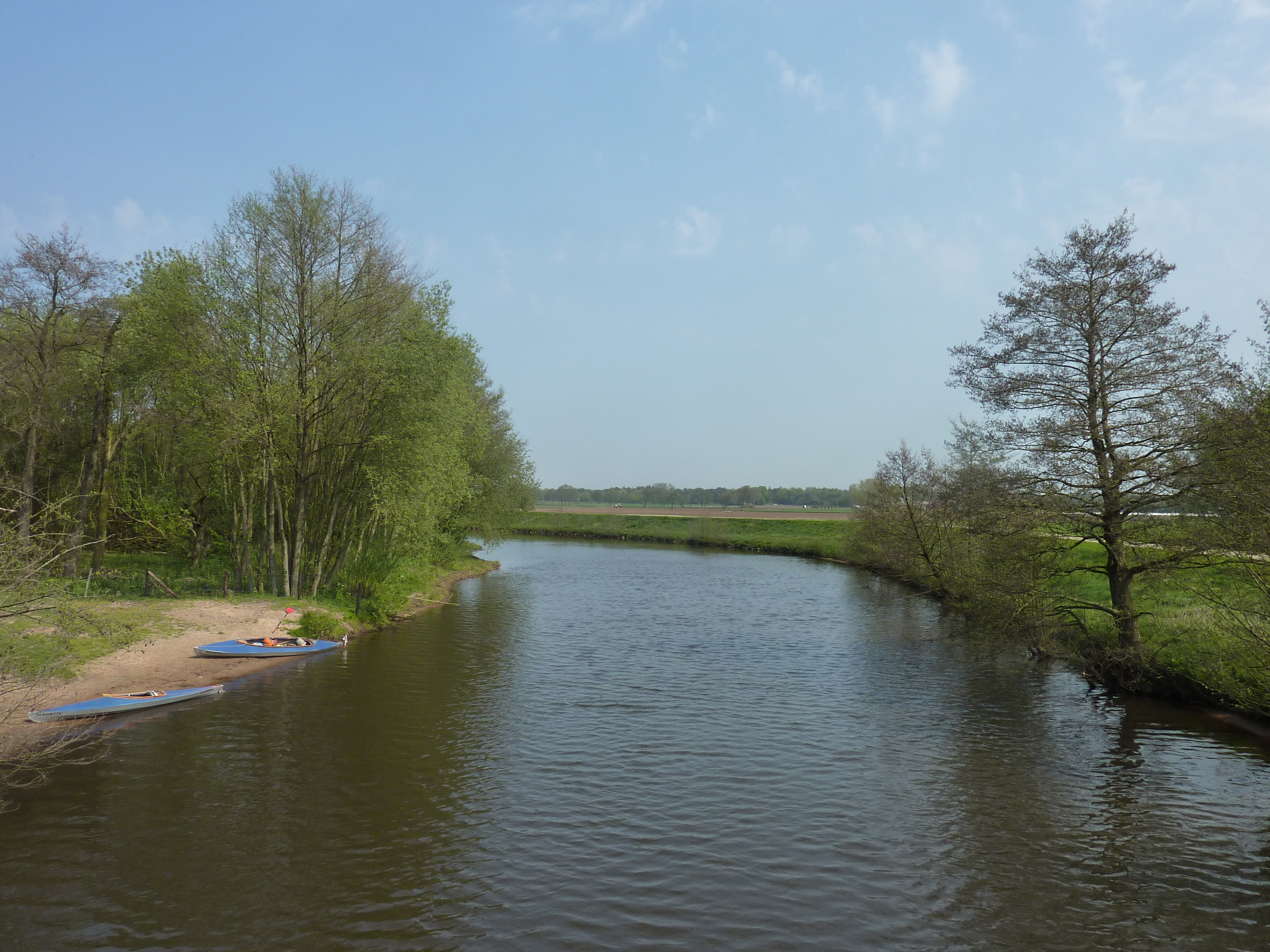 die Hunte bei Wardenburg